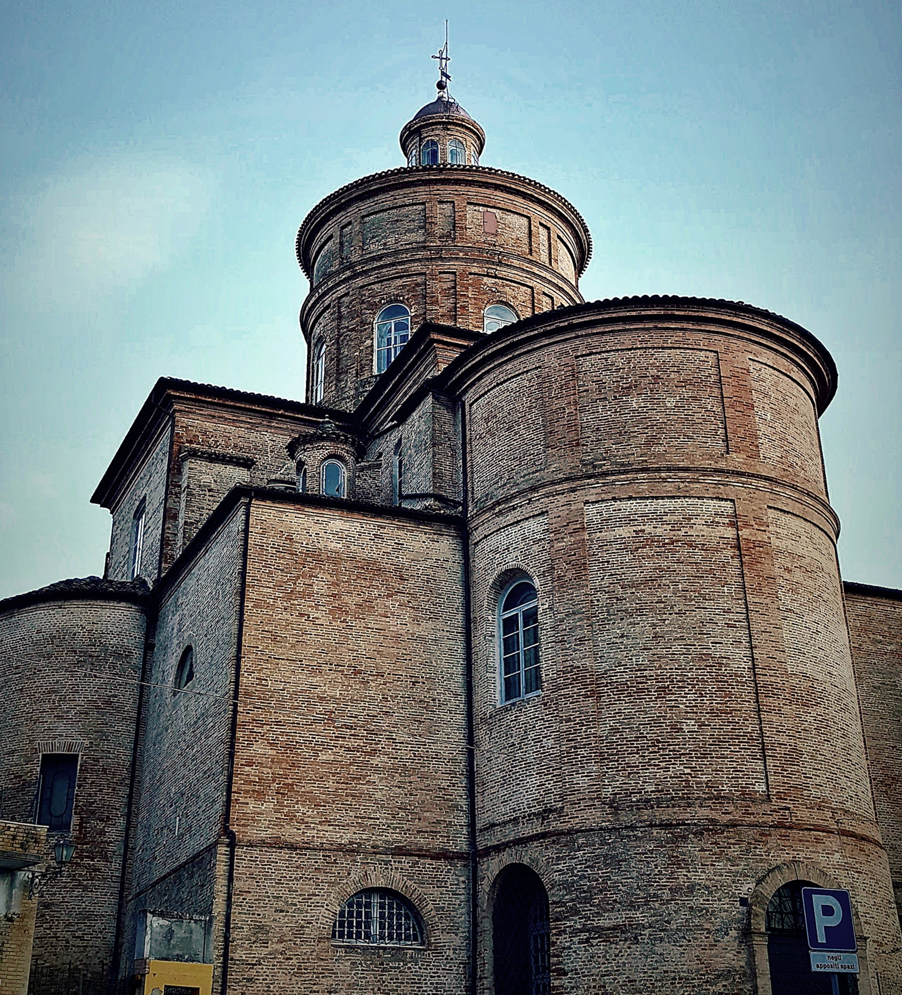 Offida, Chiesa Collegiata. Costruita tra il 1785 e il 1798 dall'architetto ticinese Pietro Maggi.